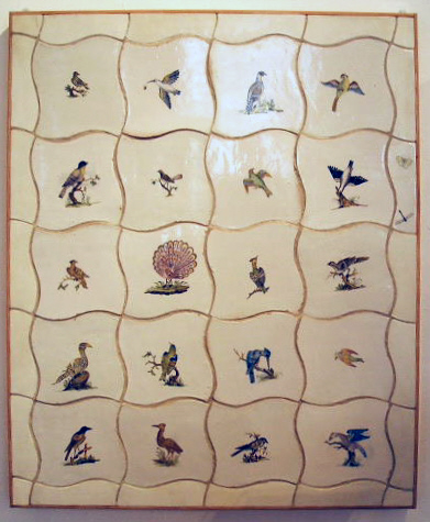 Das Foto zeigt Exponate im Kulturhistorischen Mseum in Stralsund in Stralsund im März 2007.